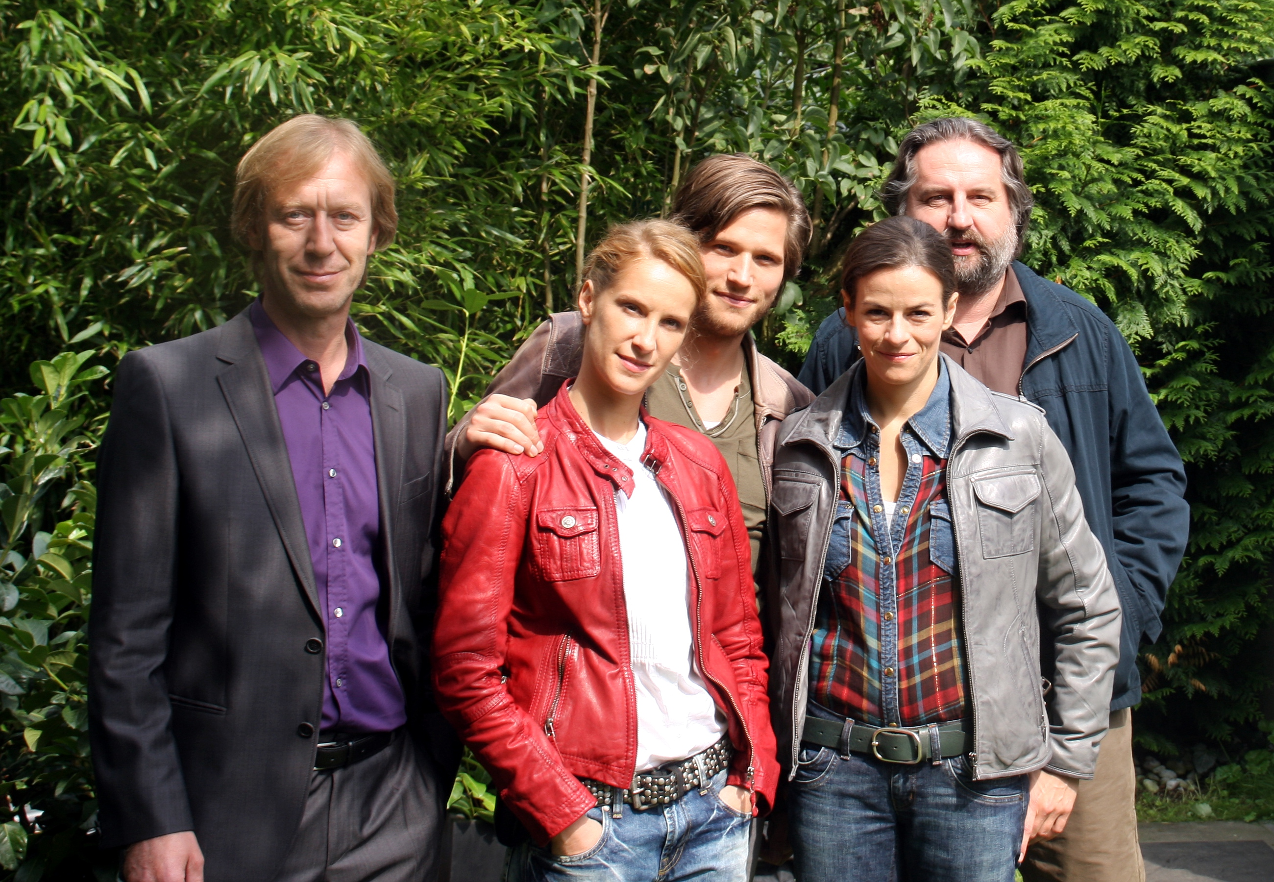 Hauptdarsteller der RTL-Serie Countdown – Die Jagd beginnt: Oliver Stritzel, Chiara Schoras, Sebastian Ströbel, Anne Diemer, Andreas Windhuis